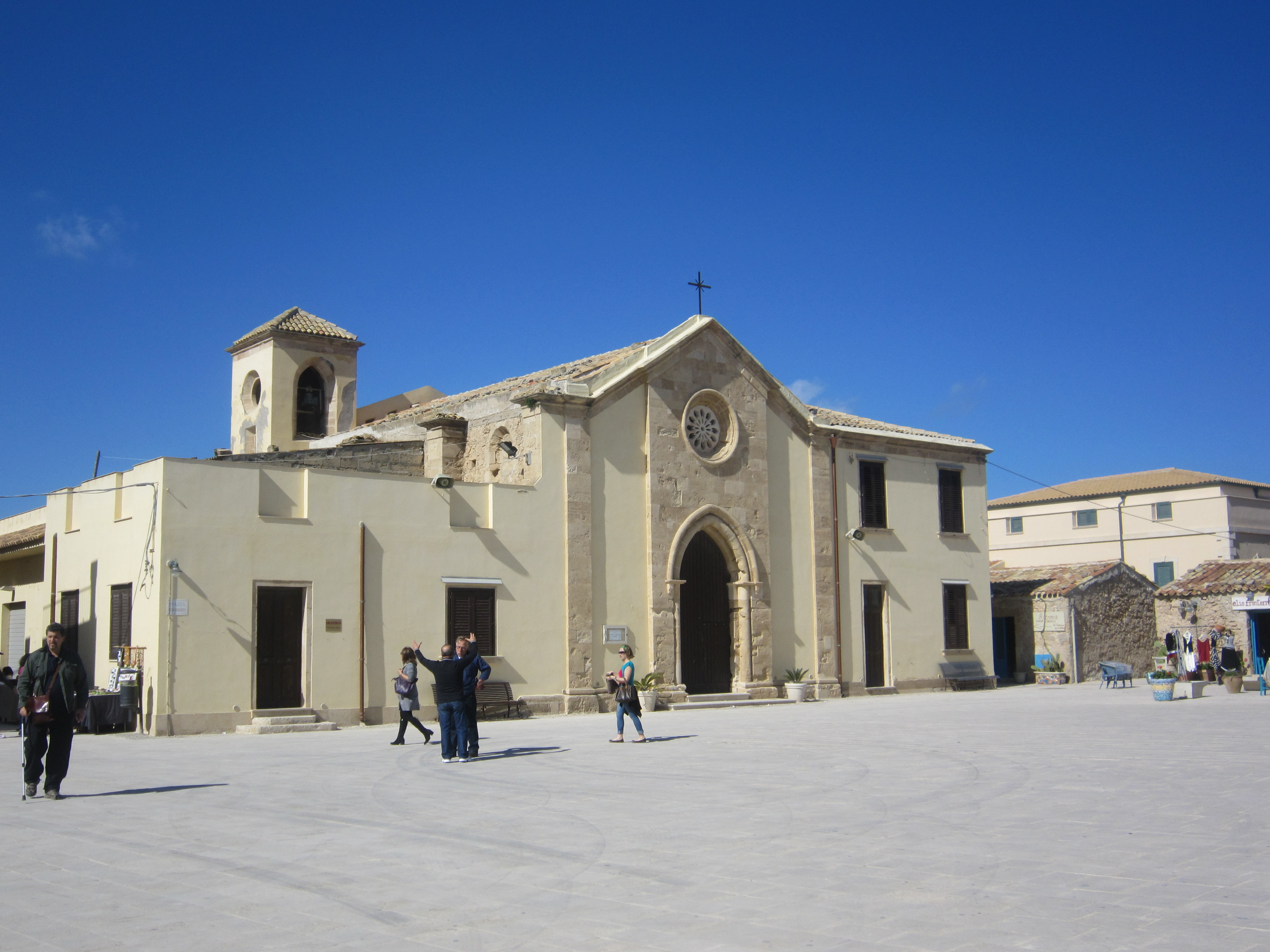 Piazza Regina Margherita, Marzamemi: Chiesa